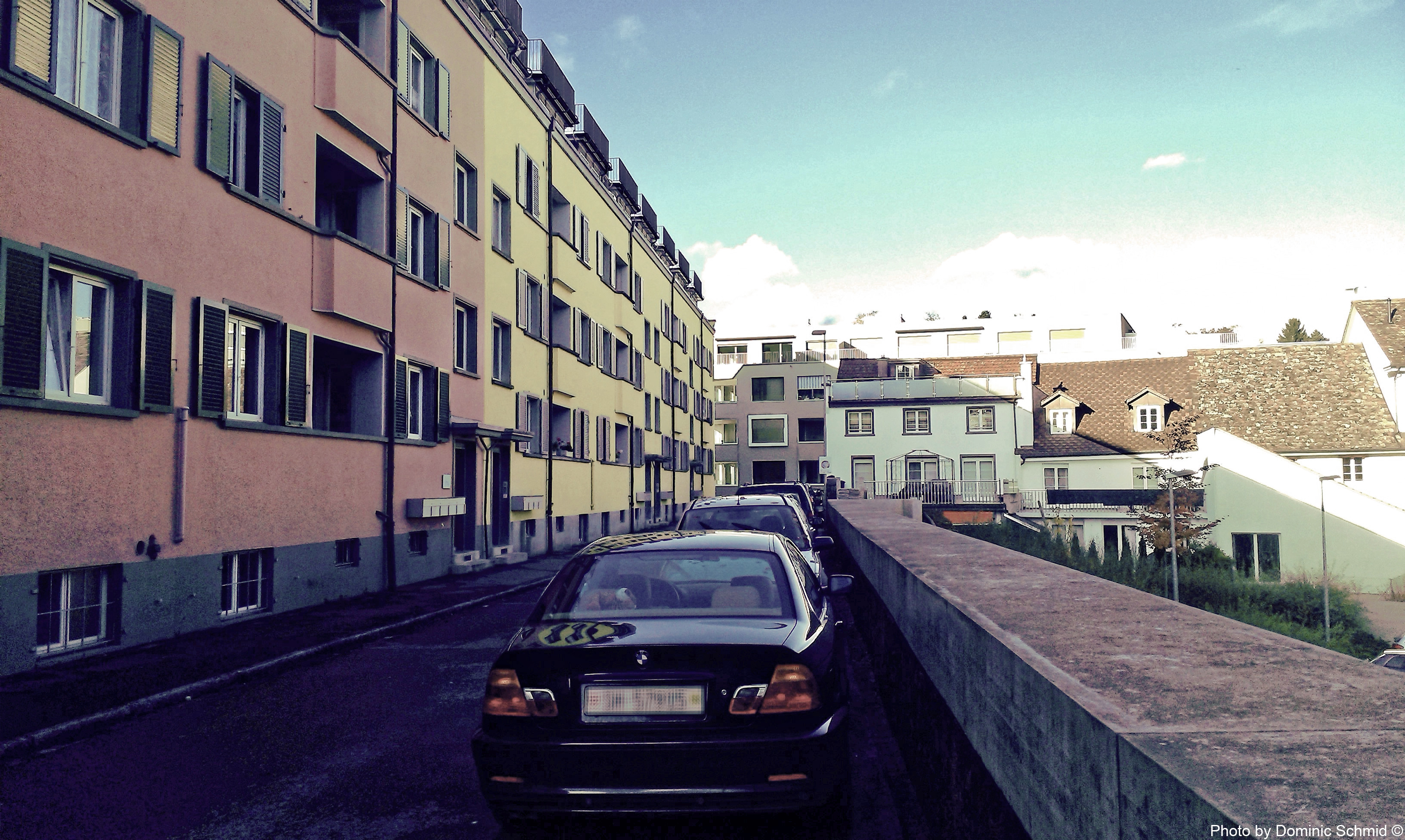 Schaffhausen, Hintersteig 11-23